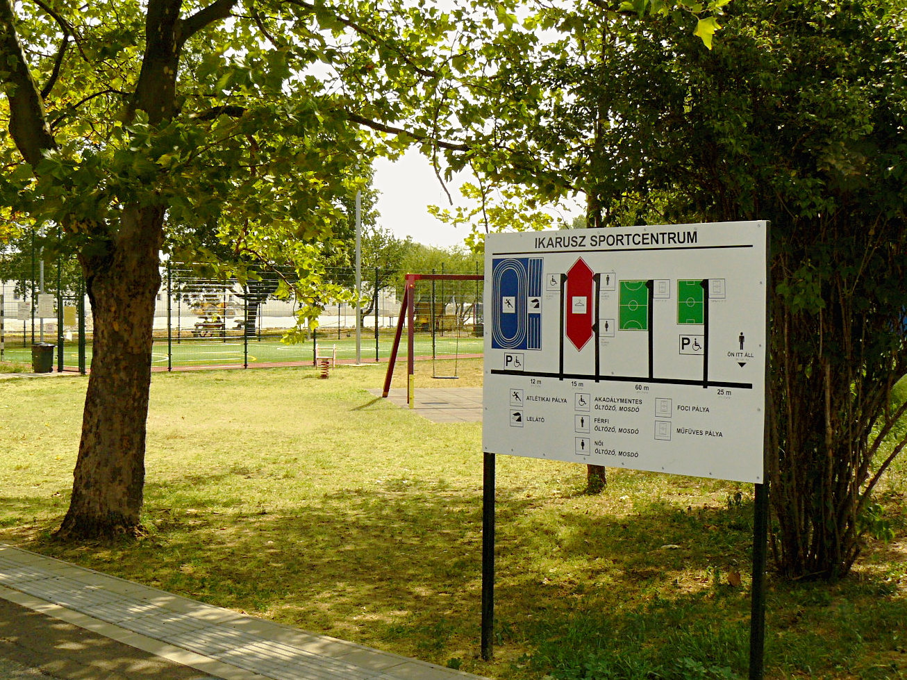 Az Ikarus Sportcentrum információs táblája